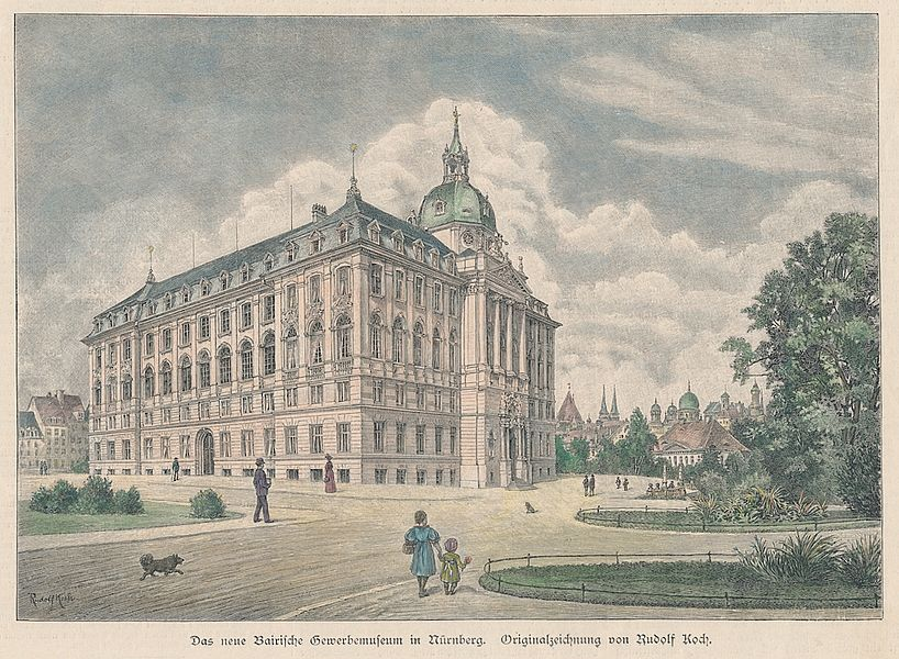 Colorierte Zeichnung - Nürnberg - Gewerbemuseum - Rudolf_Koch